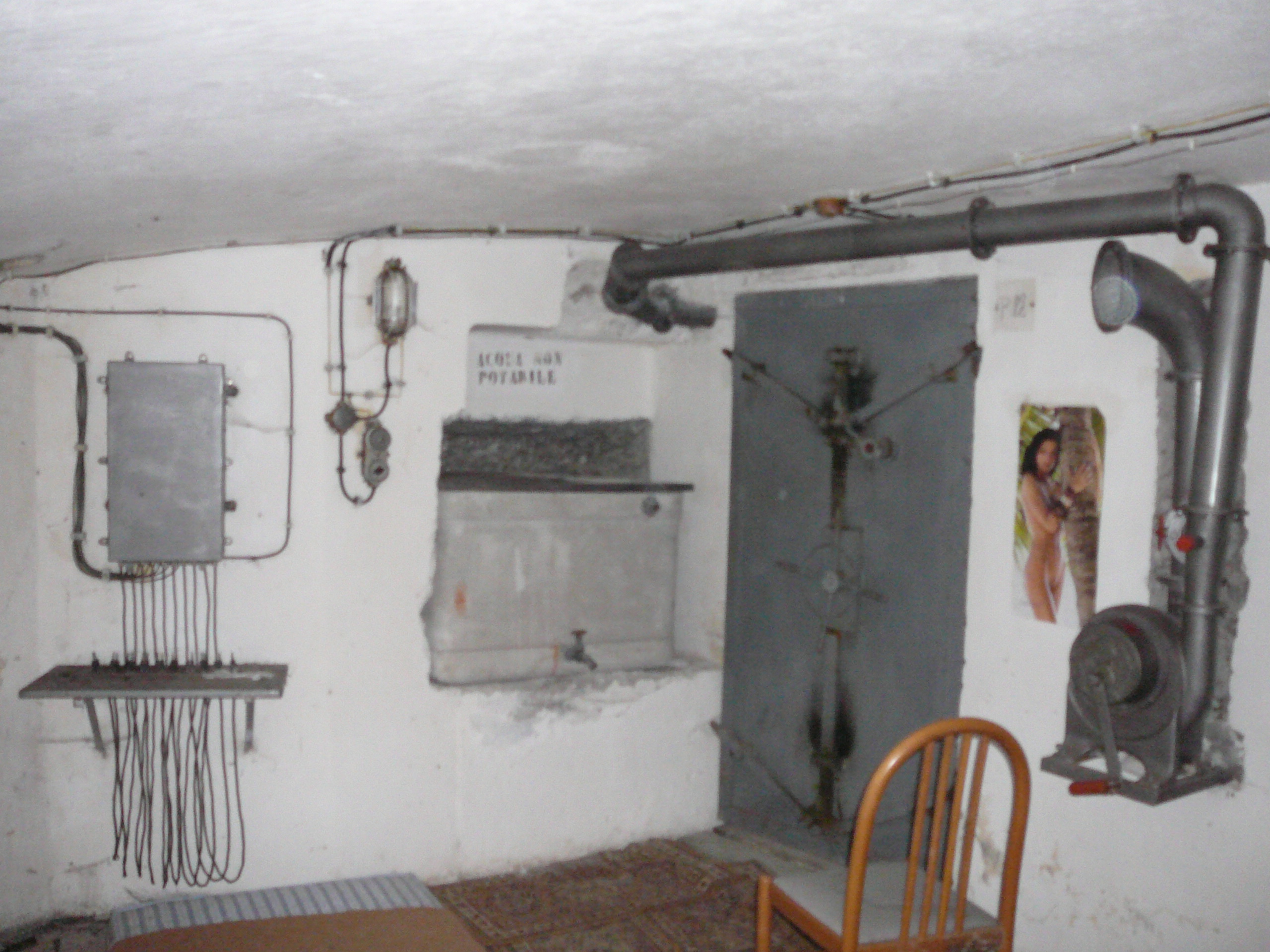 Opera_8, Tenne-Novale